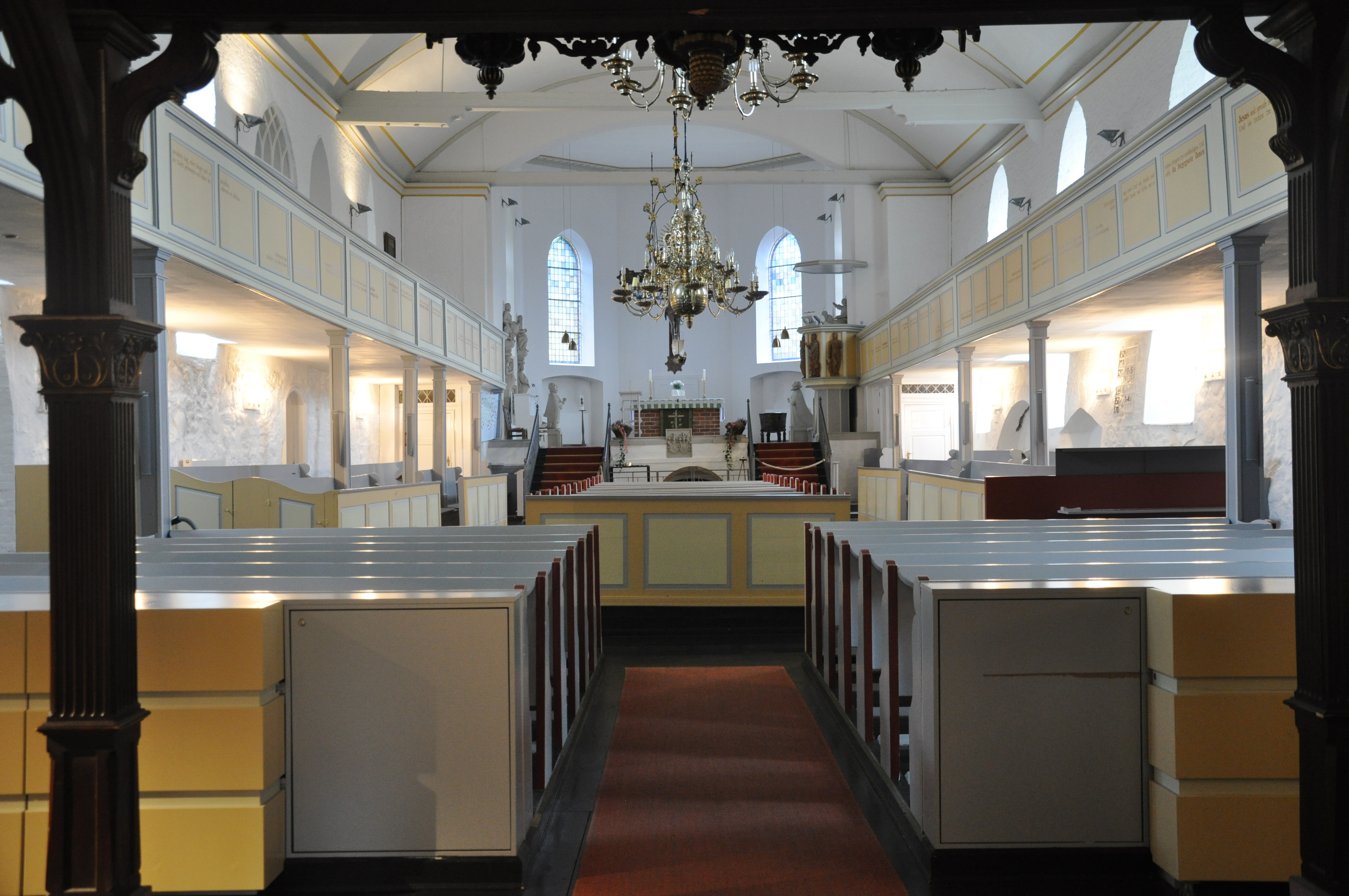 Lauenburg, Maria-Magdalenen-Kirche